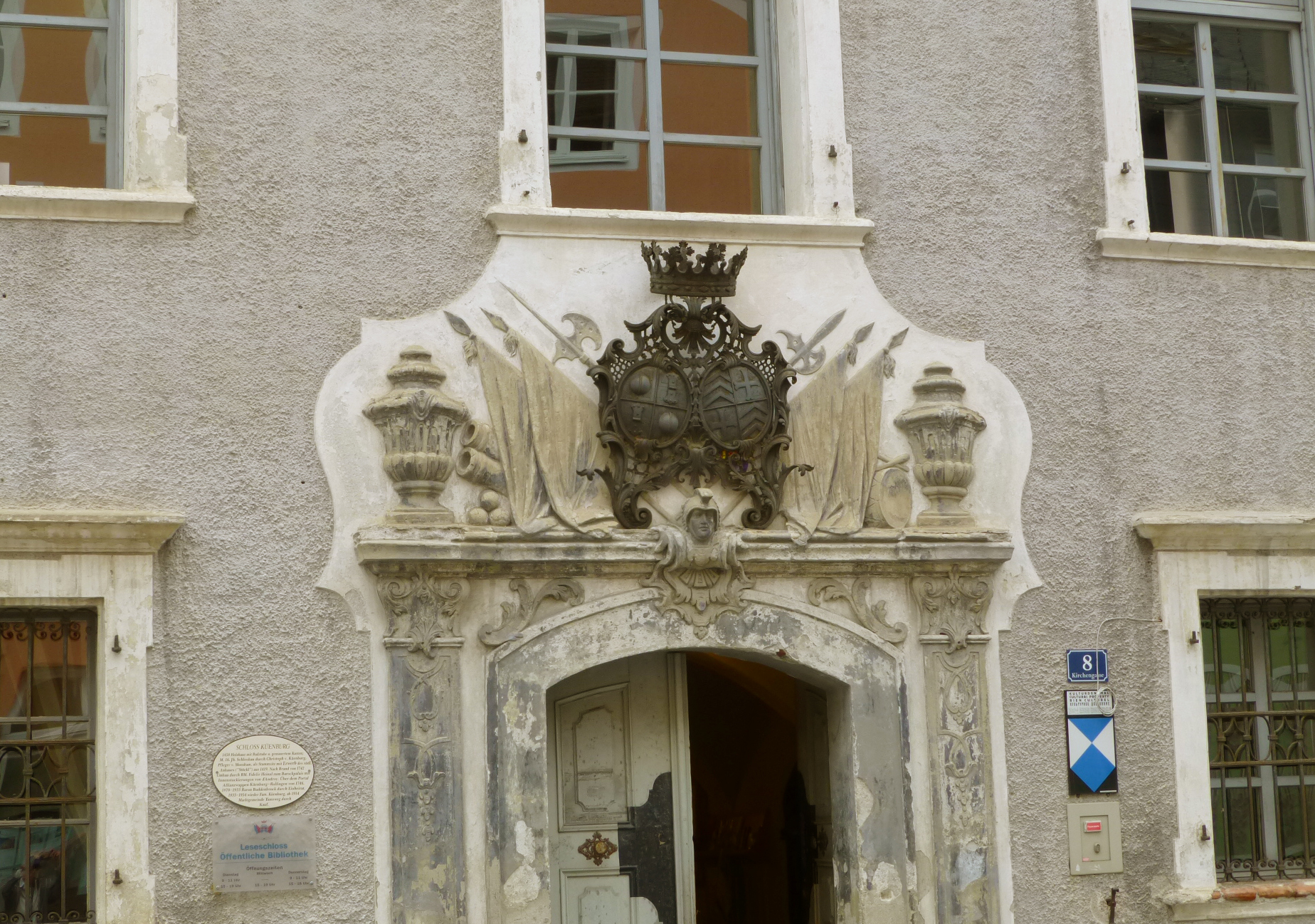 Kirchengasse 8, Schloss Kuenburg, Tamsweg Kulturzentrum (Salzburg Land). Wappen Kuenburg-Rollinger.